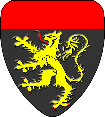 Armoiries de la commune de Léau, blasonné de sable au lion d'or armé et lampassé de gueules, au chef cousu du second